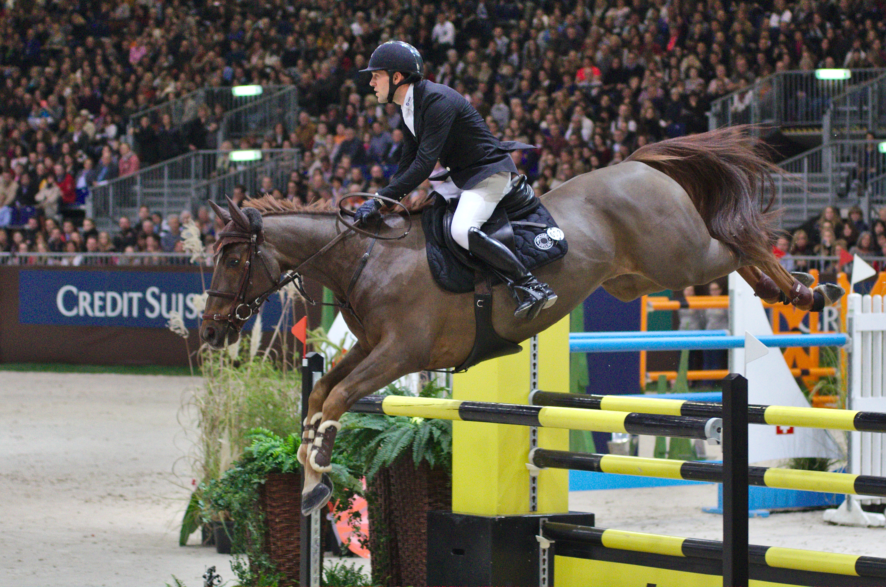 54eme CHI de Genève - 20141213 - Prix Credit Suisse - Simon Delestre et Ryan des Hayettes